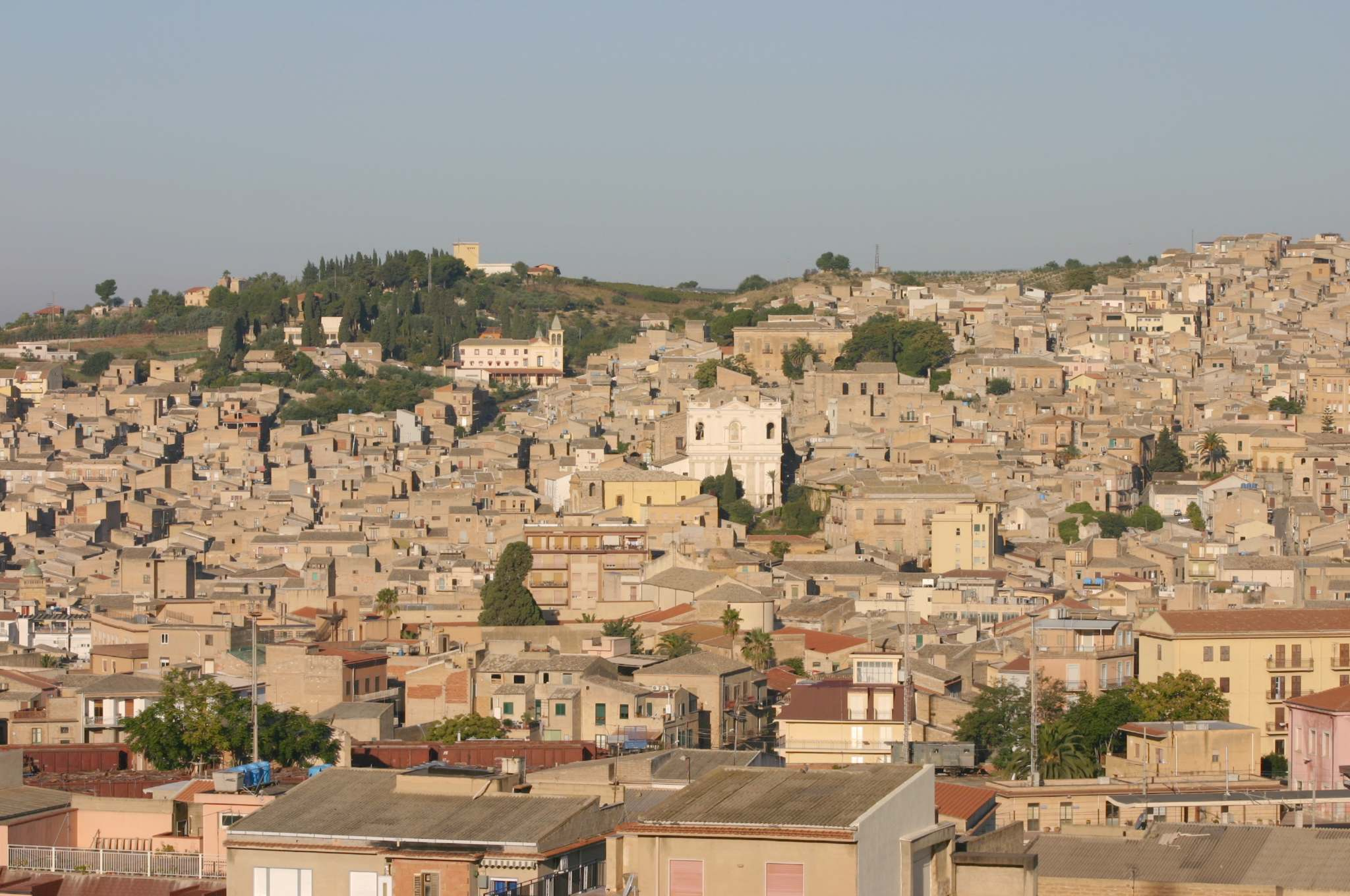 Canicattì (AG) - Panorama centro storico